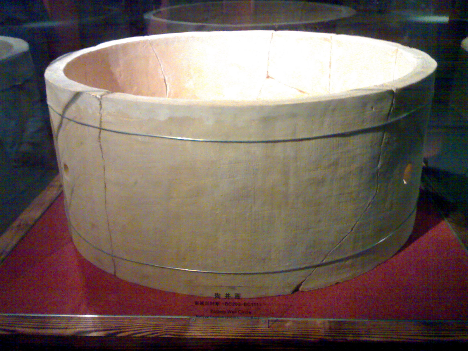 Bên ngoài chiếc giếng bằng gốm tại Bảo tàng di tích đập nước bằng gỗ thời Triệu ở thành phố Quảng Châu, tỉnh Quảng Đông, Trung Quốc